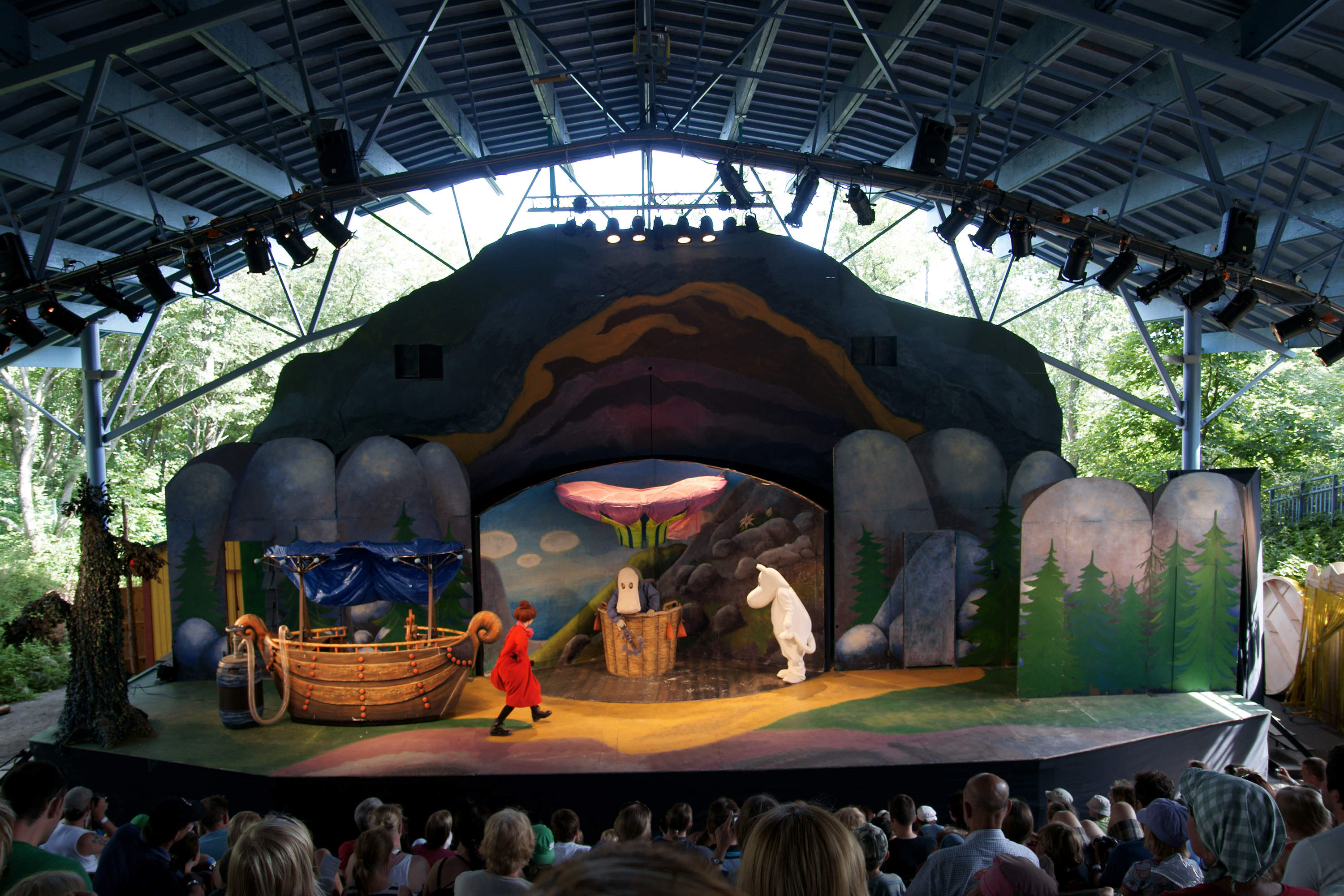 Muumiesitys menossa Teatteri Emmassa.